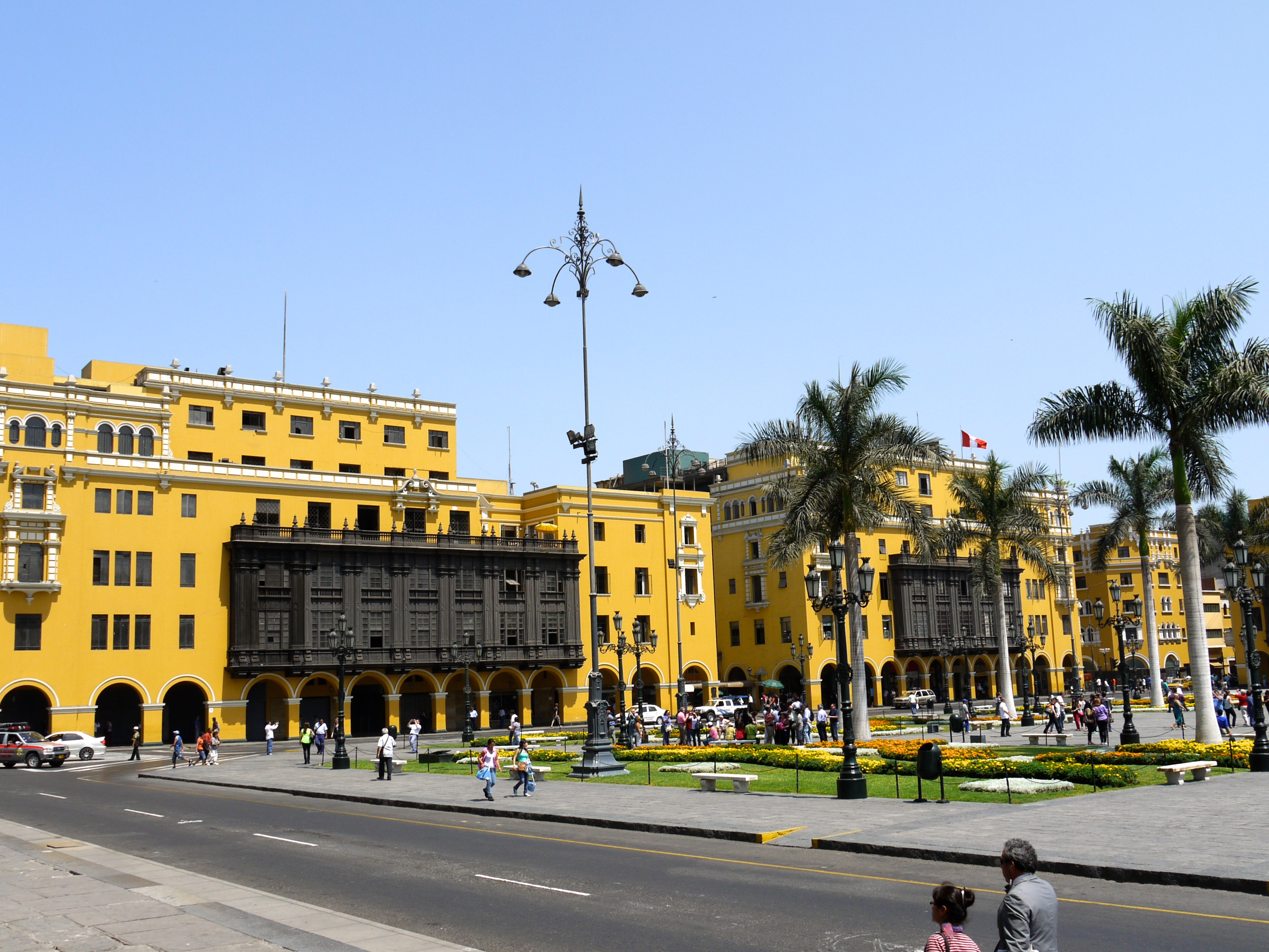 P1030144 Pérou, Lima, Plaza Mayor, édifices au sud de la place